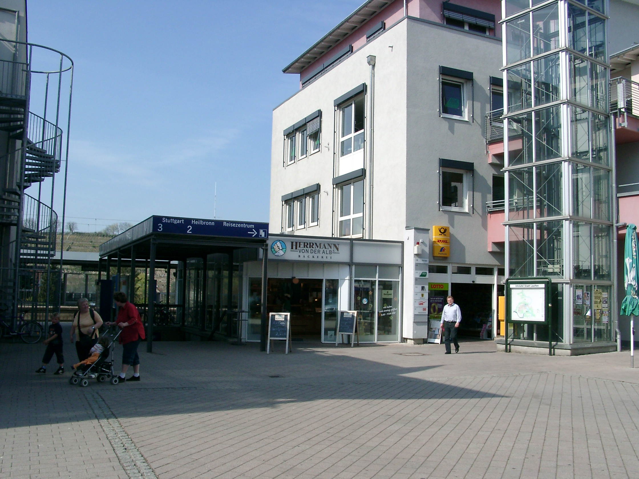 Lauffen am Neckar, Bahnhof